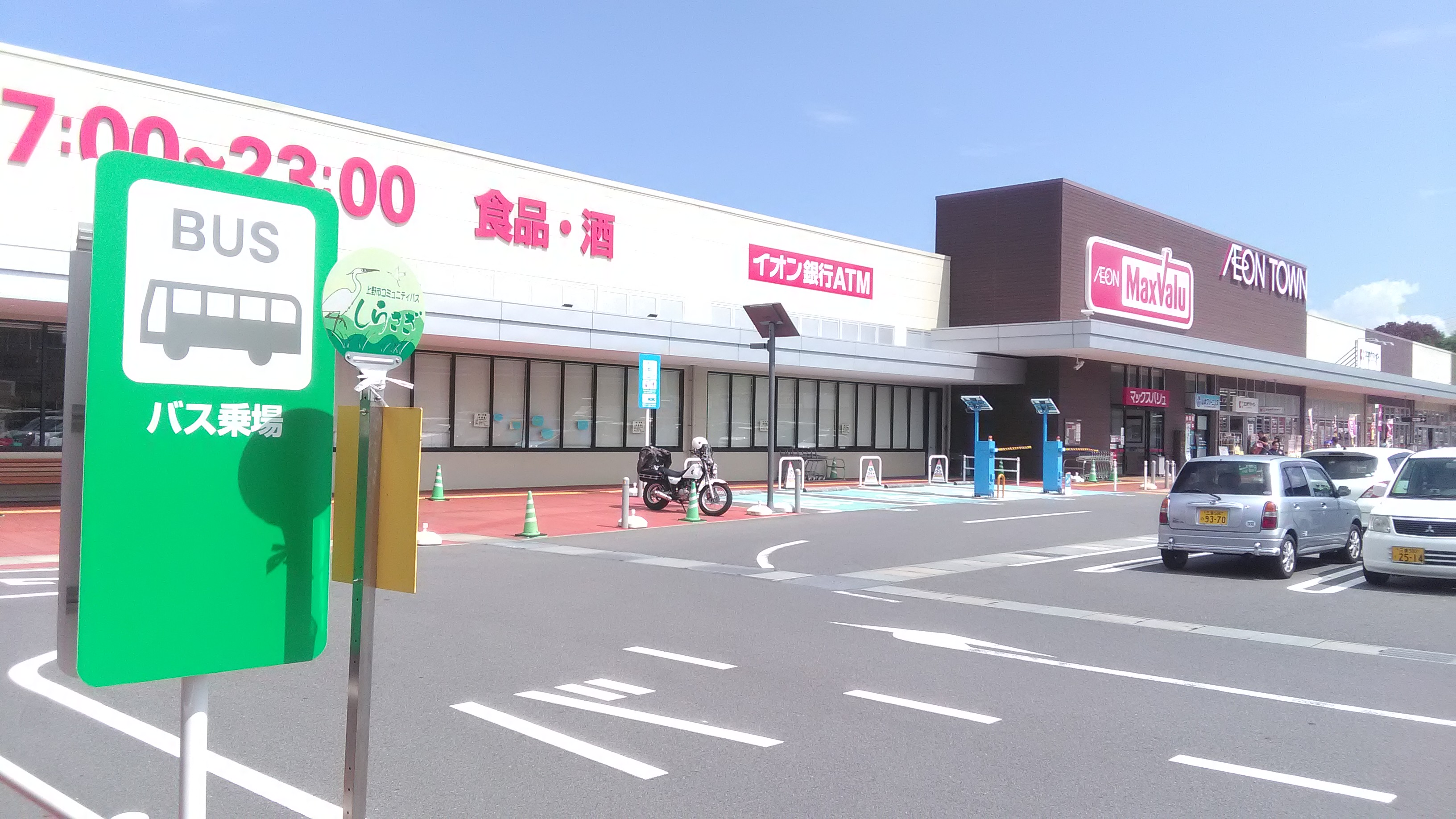 上野コミュニティバス「イオンタウン伊賀上野」バス停留所。